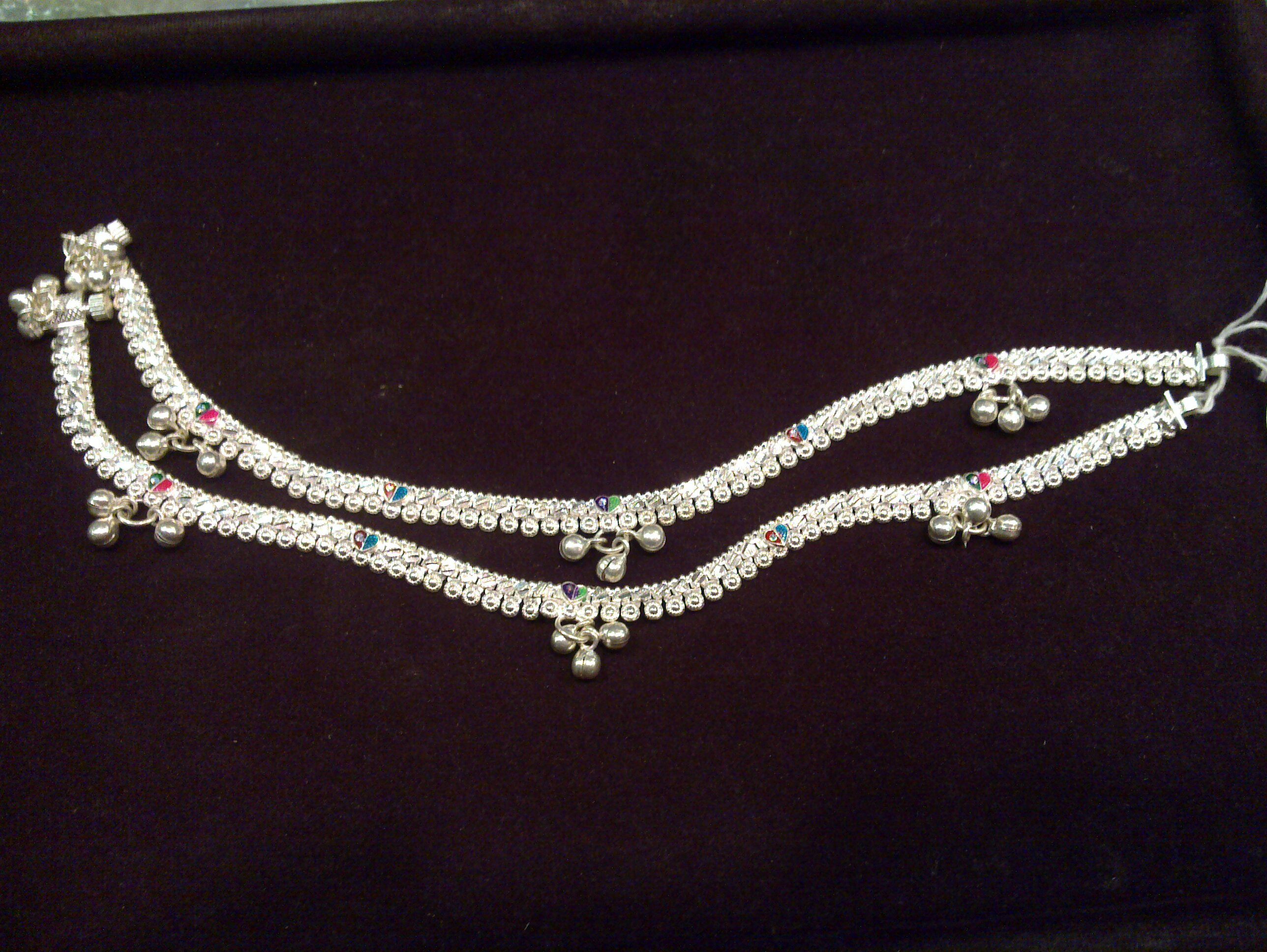 Indian ornaments named kolusu in silver